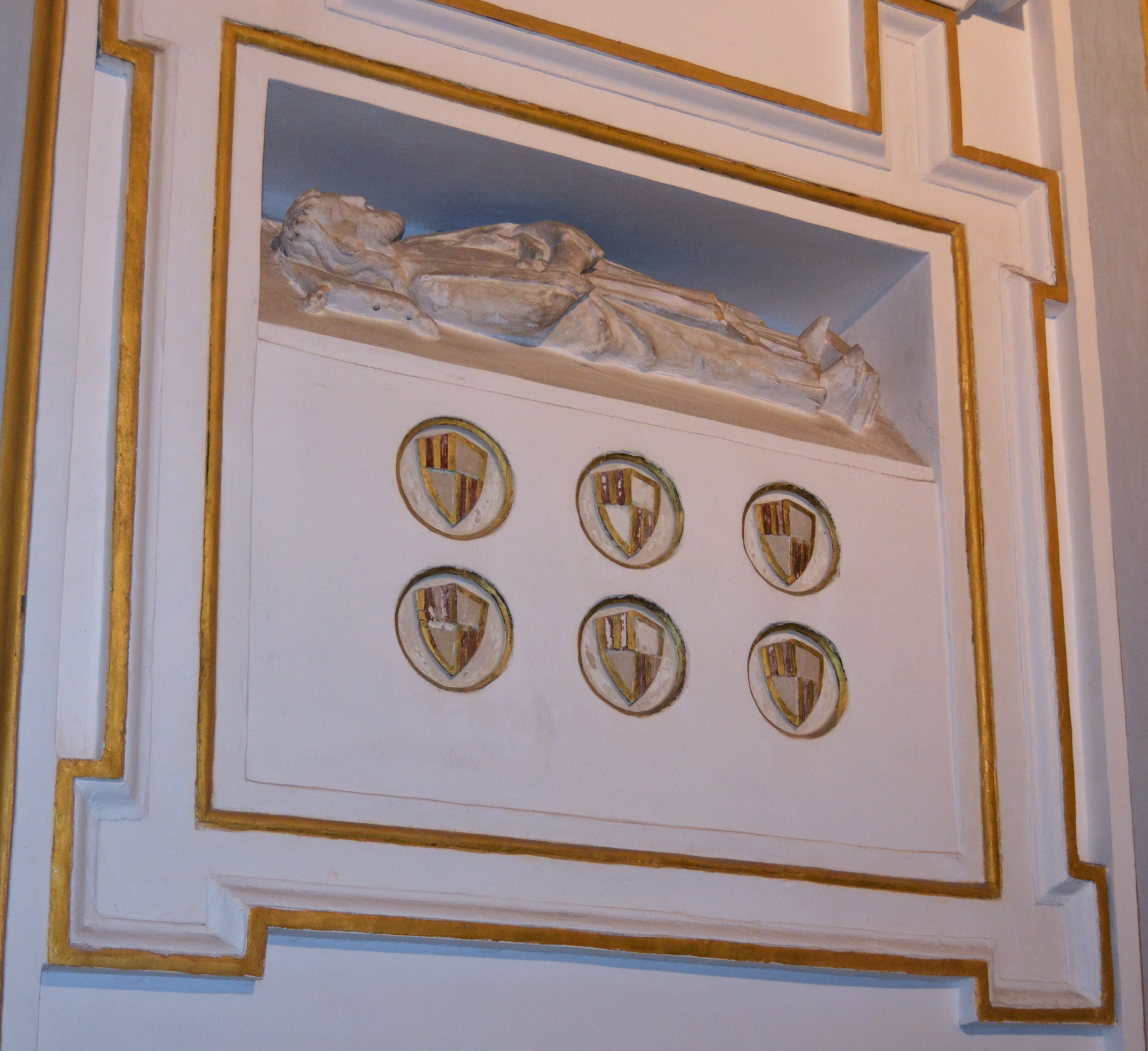 Sepulcre de Berenguer Guillem d'Entença, oncle del Jaume I el, Conqueridor mort en 1227, abans de la reconquista de València. Adornat amb xicotets escuts amb les armes reials d'Aragó. Capella de la Mare de Déu del Roser, catedral de València.